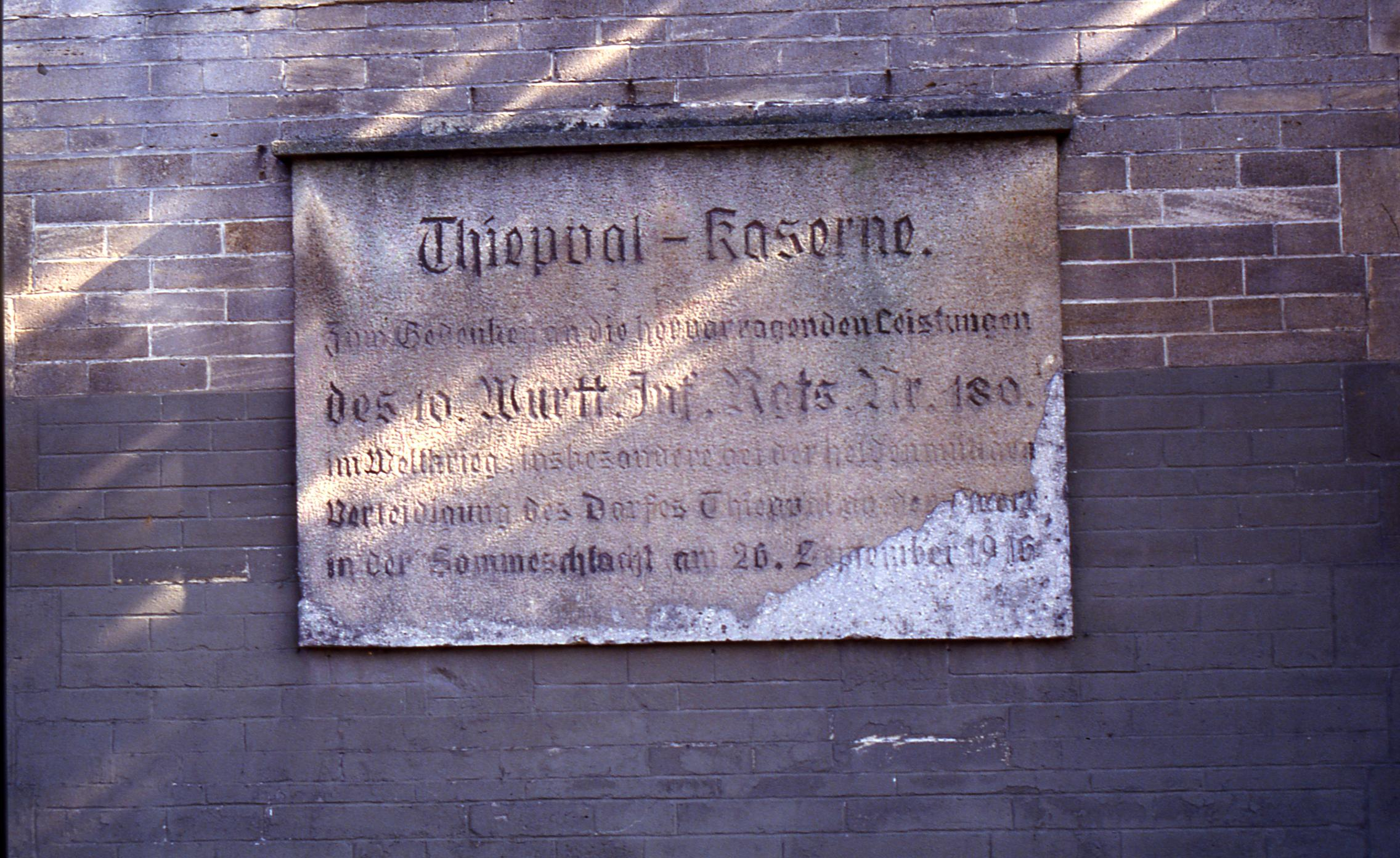 Steintafel an der Mauer der ehemaligen Thiepval-Kaserne in der Tübinger Südstadt.